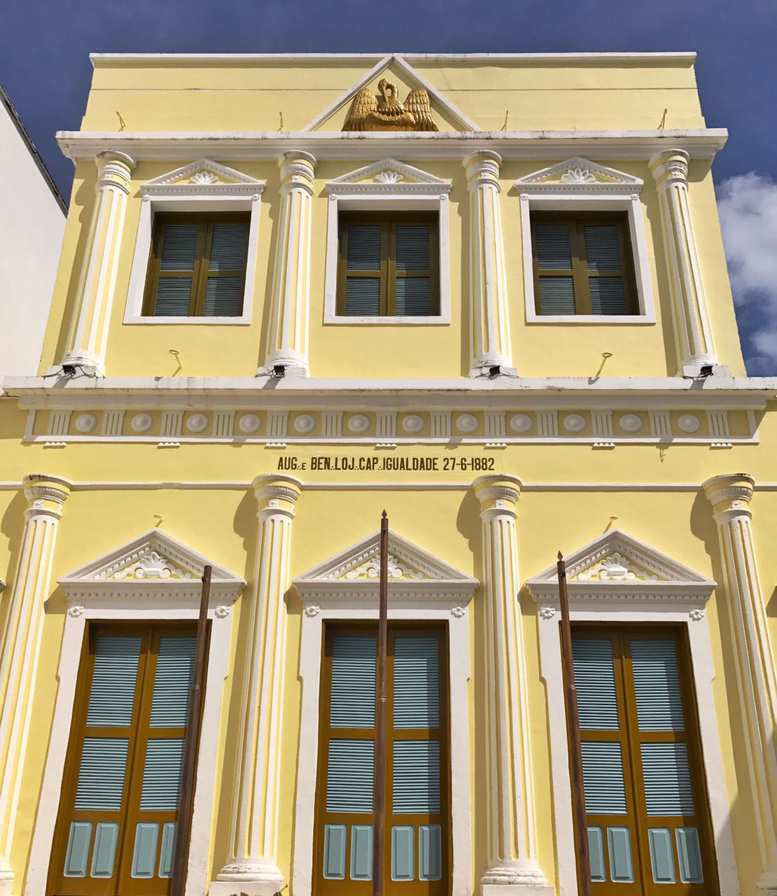 A Augusta Benfeitora Benemérita Loja Simbólica Igualdade nº 405 Fundada em 27 de junho de 1882 Jurisdicionada ao Grande Oriente do Brasil Ceará Federada ao Grande Oriente do Brasil